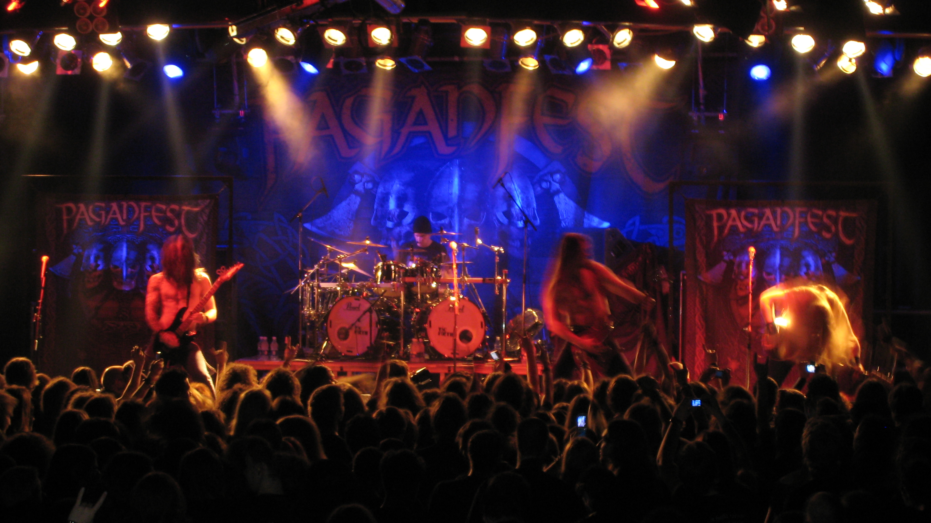 Týr live beim Paganfest in München.